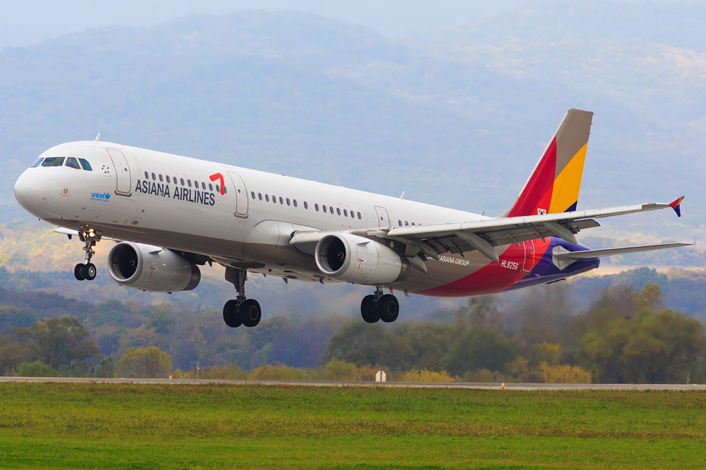 VVO_9611